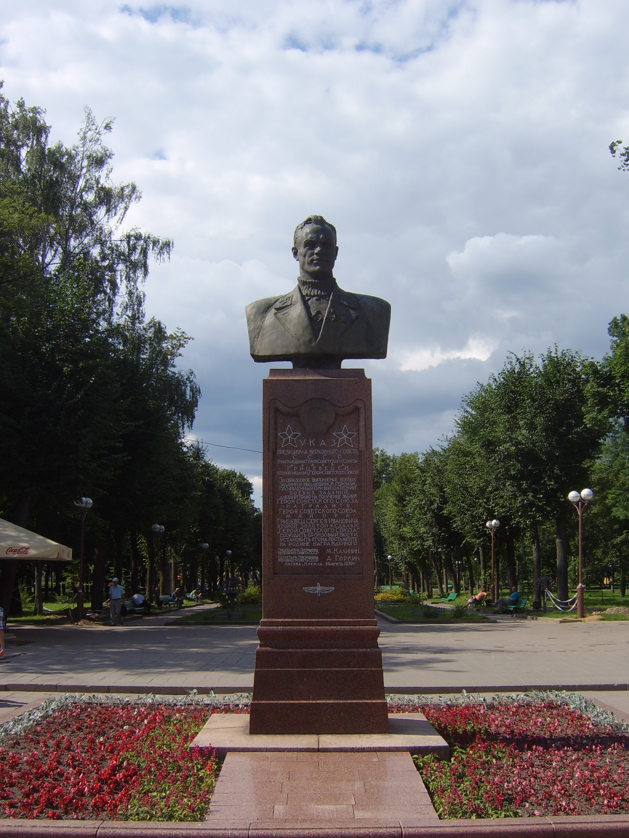 Беларуская (тарашкевіца): Бюст С. І. Грыцаўца. г. Баранавічы This is a photo of Belarusian heritage monument. Reference number: 113Ж000039 ( WLM)